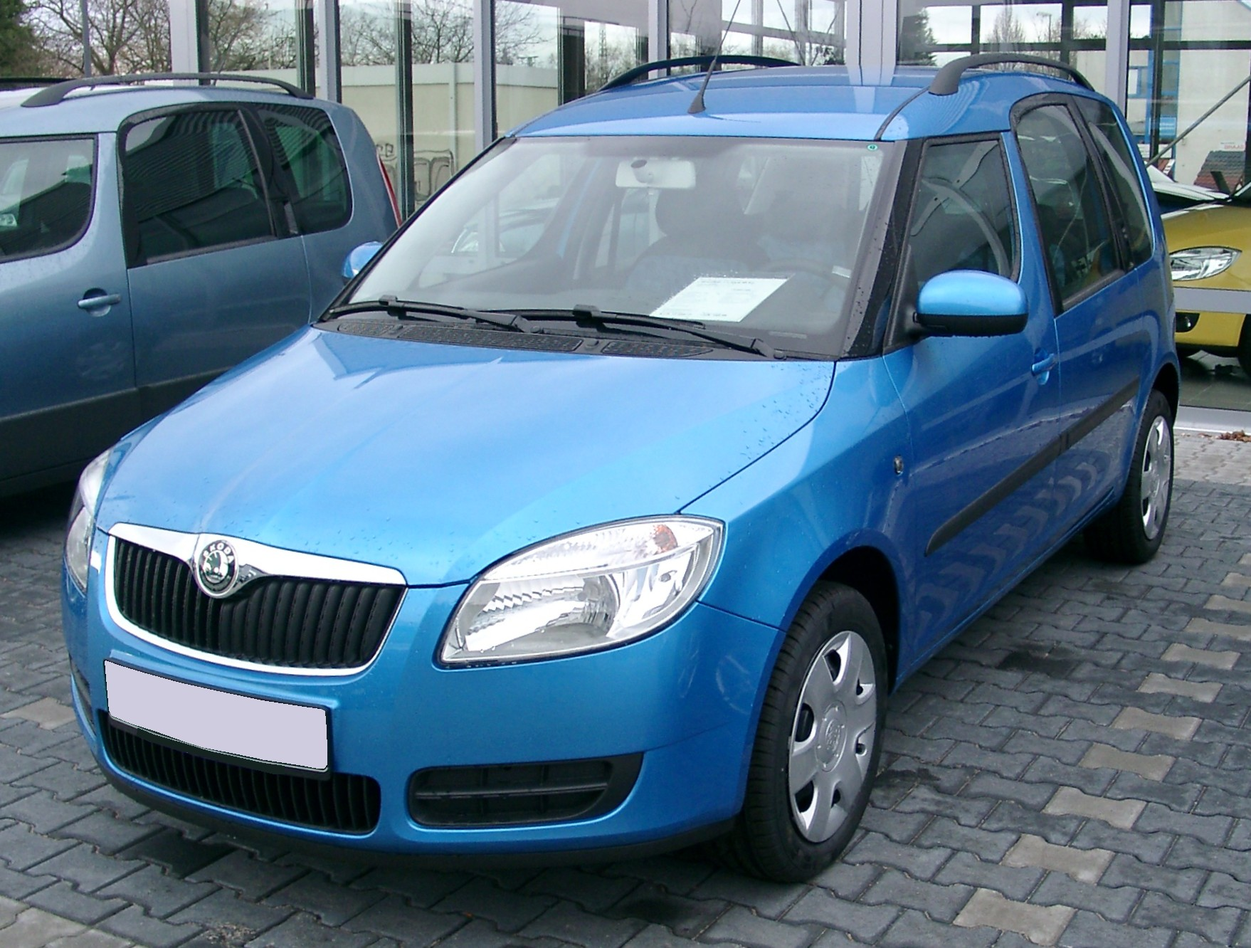 Škoda Roomster